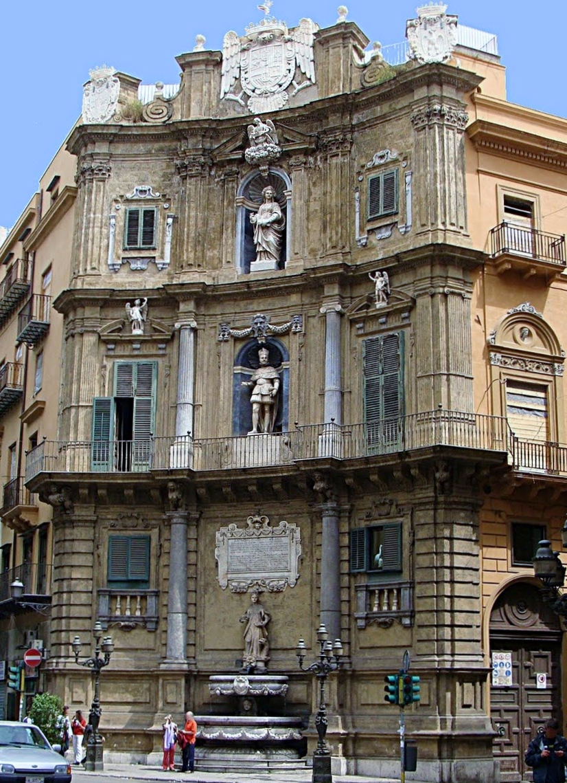 Il palazzo cinquecentesco posseduto dalla famiglia Polizzi dal 1617 alla fine del XVIII secolo ai Quattro Canti di Palermo